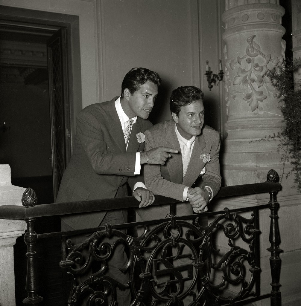 Los hermanos Gustavo y Rubén Rojo en el Festival de Cine de San Sebastián (82/110) Localización: San Sebastián (Guipúzcoa)